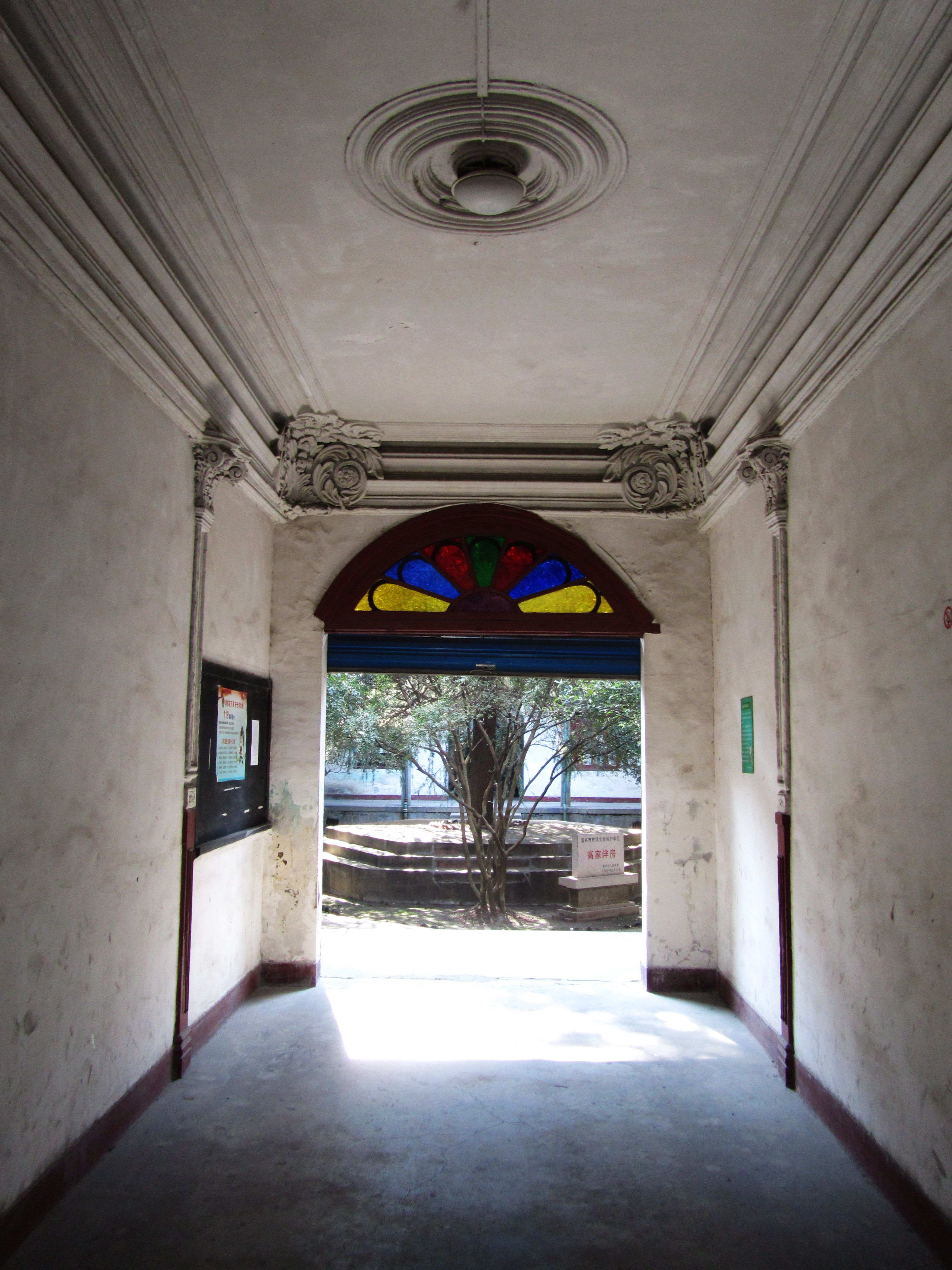 嘉兴高家洋房，北侧门厅室内。